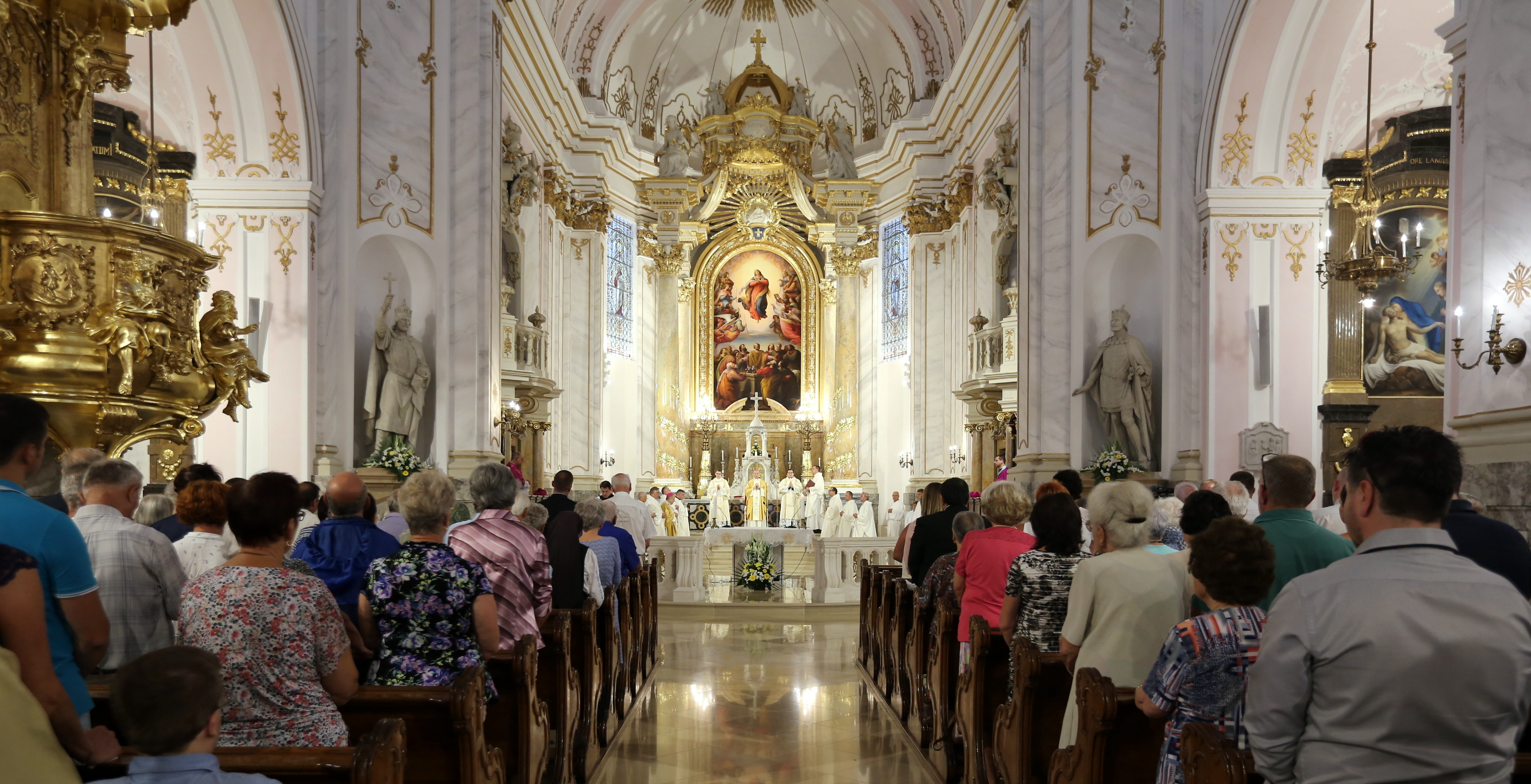 2018. Augusztus 15-én, Szűz Mária mennybevételének ünnepén búcsút ünnepeltek a kalocsai Nagyboldogasszony Főszékesegyházban [1]. Érseki nagymise. A fő szónoka Udvardy György pécsi püspök. [2]